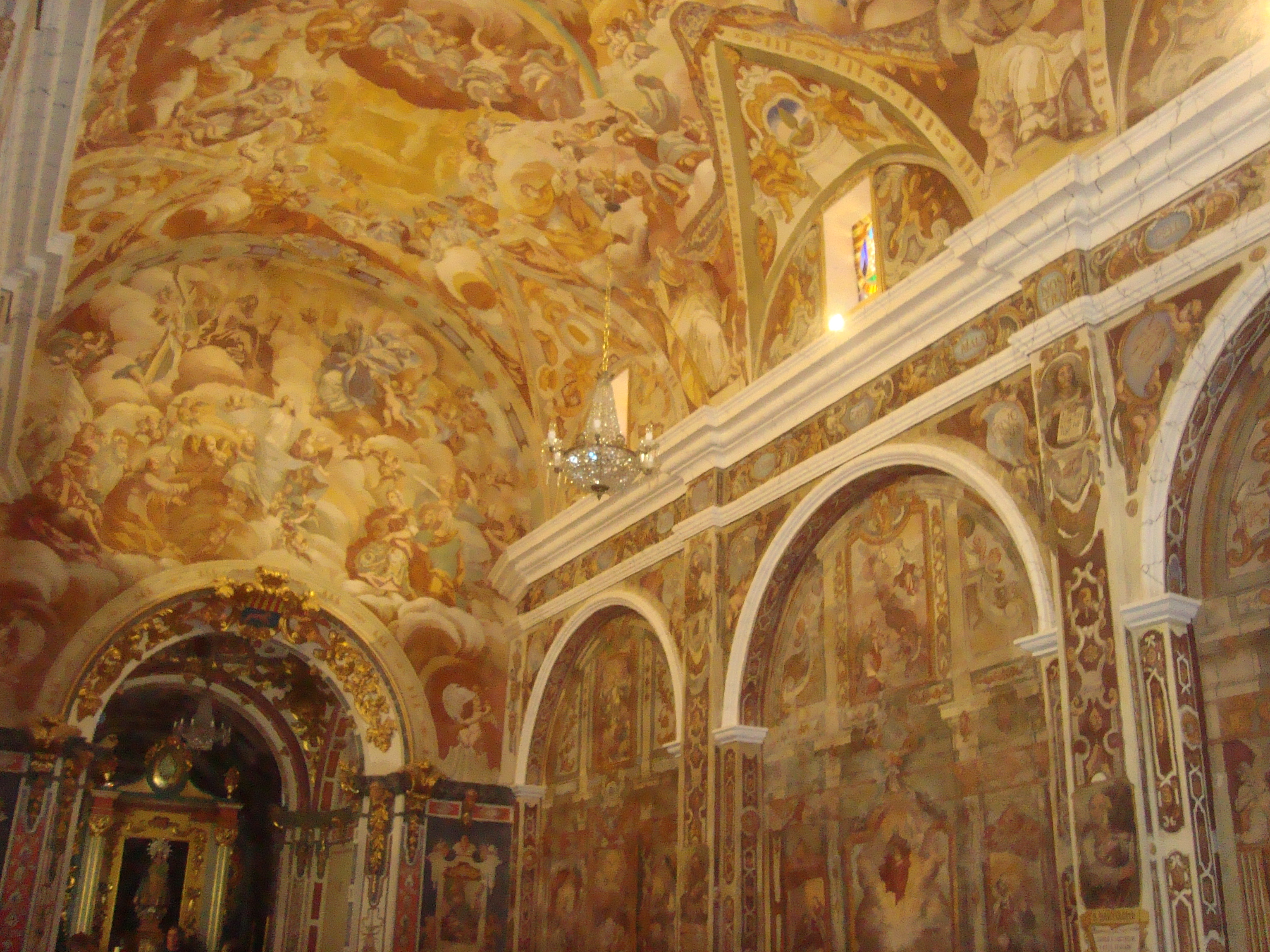 Ermita de la Madre de Dios del Avellá 02.042-002.